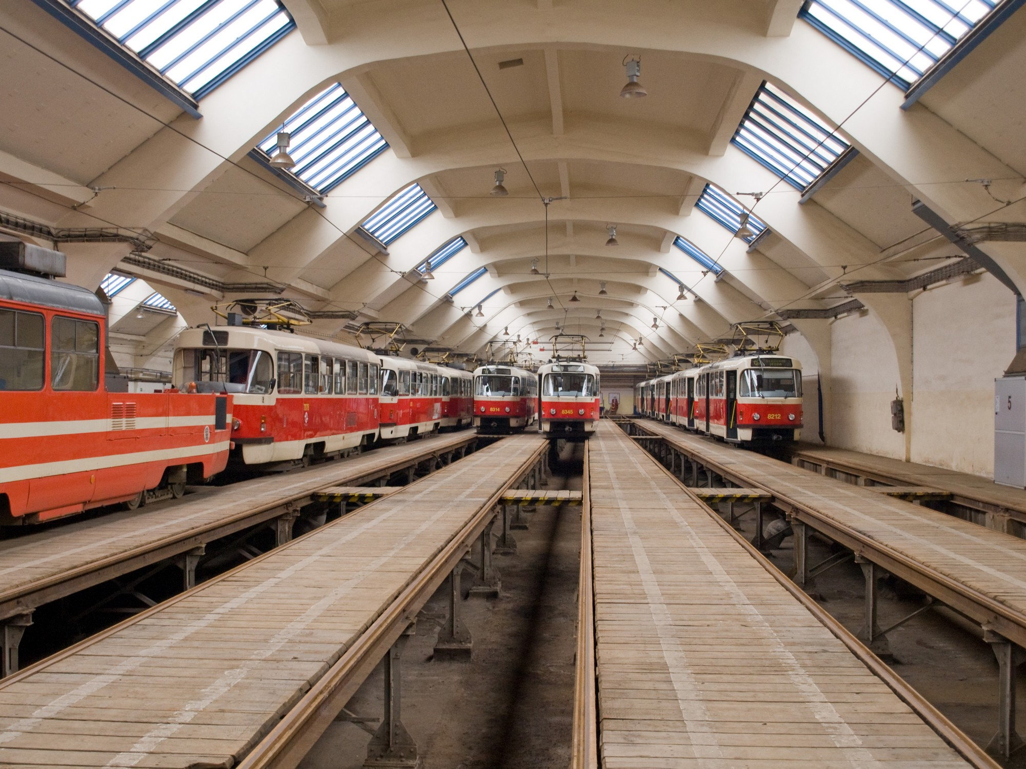 Hala vozovny Pankrác, Praha